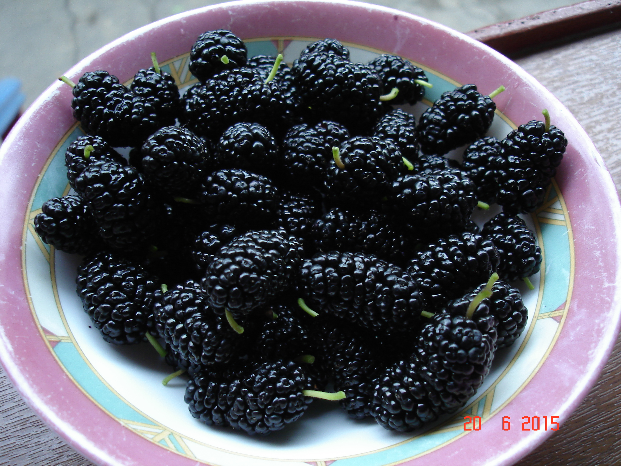 Зрелые плоды чёрной шелковицы (Каменский район Ростовская область)